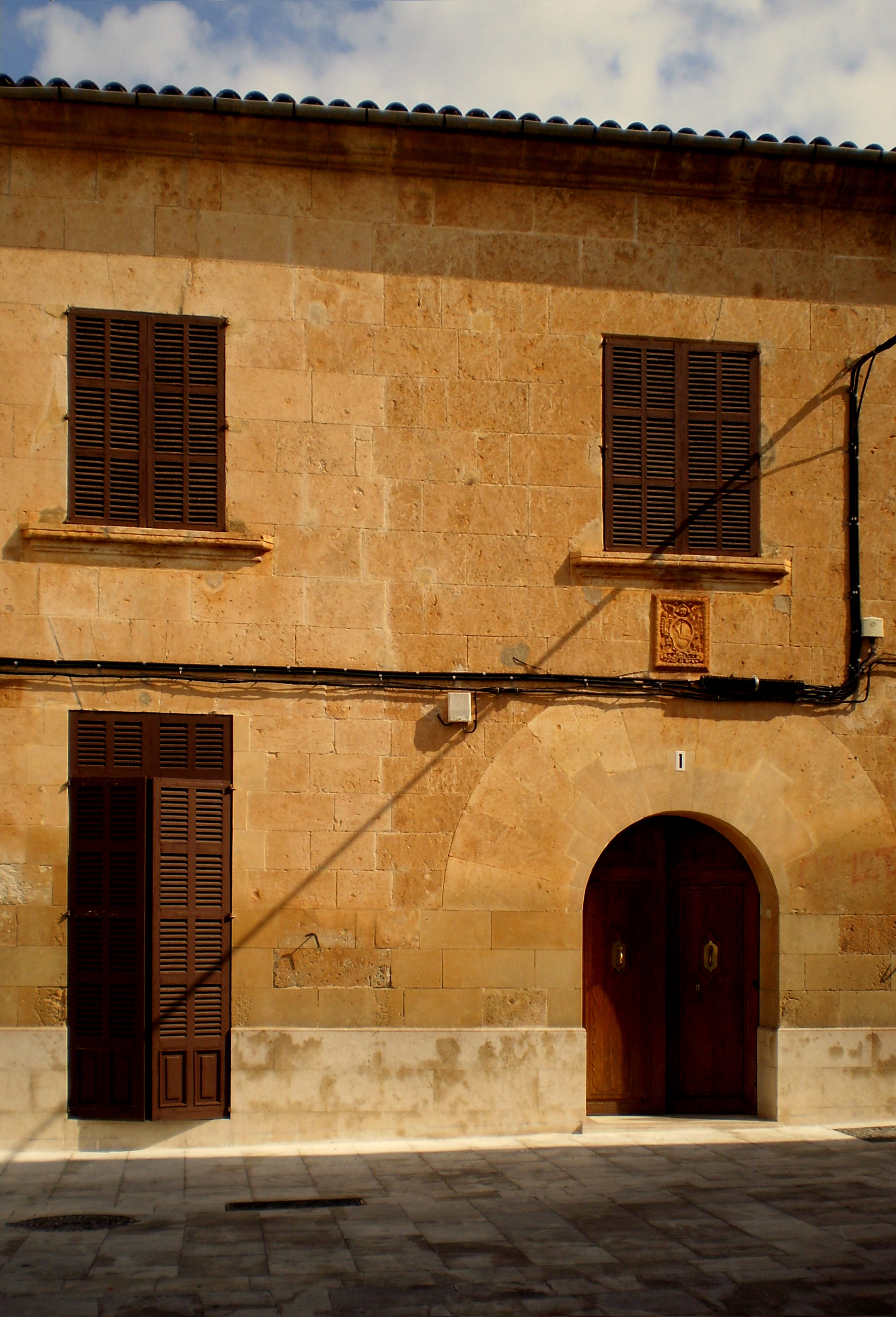 Marès Fassade aus Felanitxstein